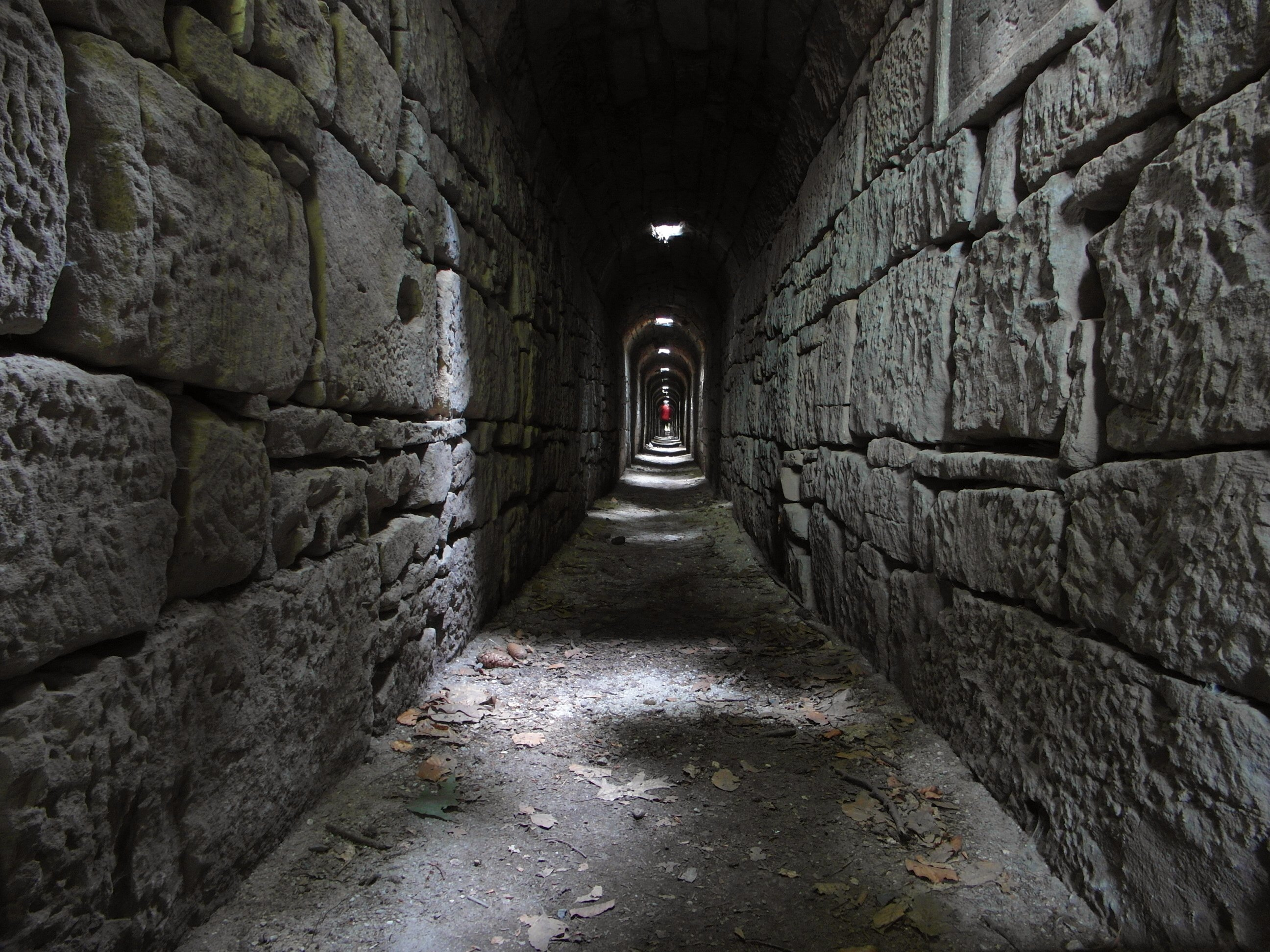 Tunnel in der Jagdanlage Rieseneck zum unbemerkten Annähern an das Wild